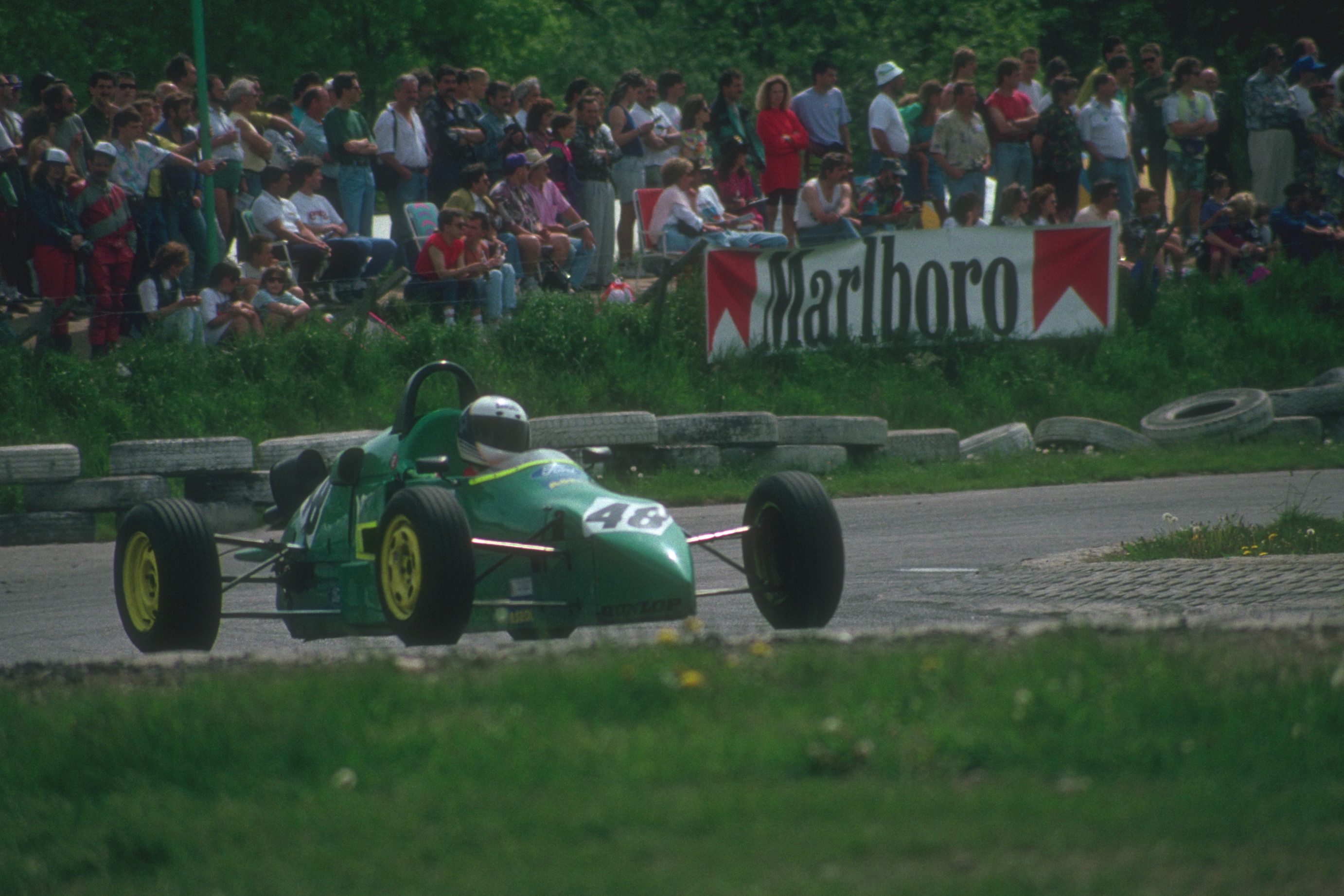 Formel Ford (Modell Faster)